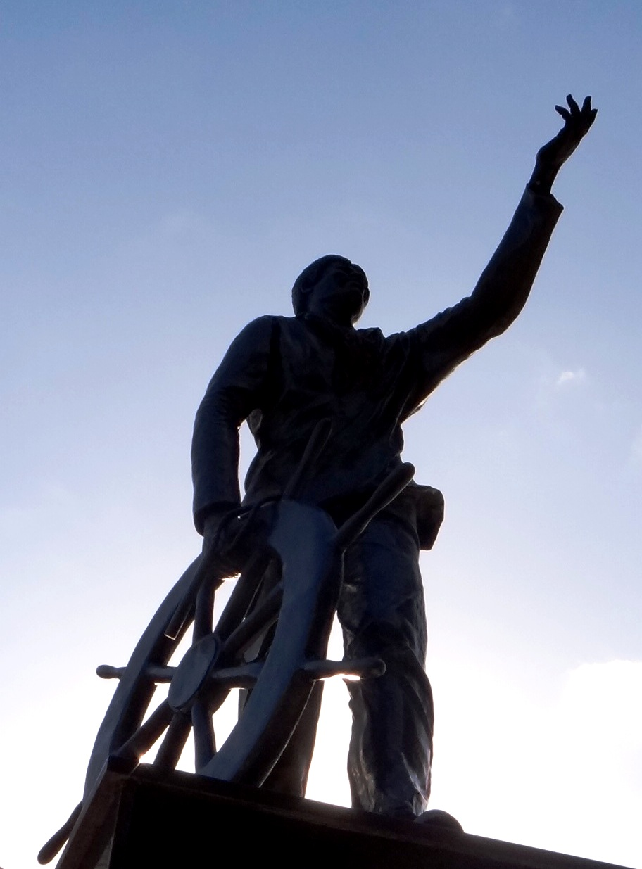 Monumento a João Cândido na Praça XV, Rio de Janeiro, RJ.